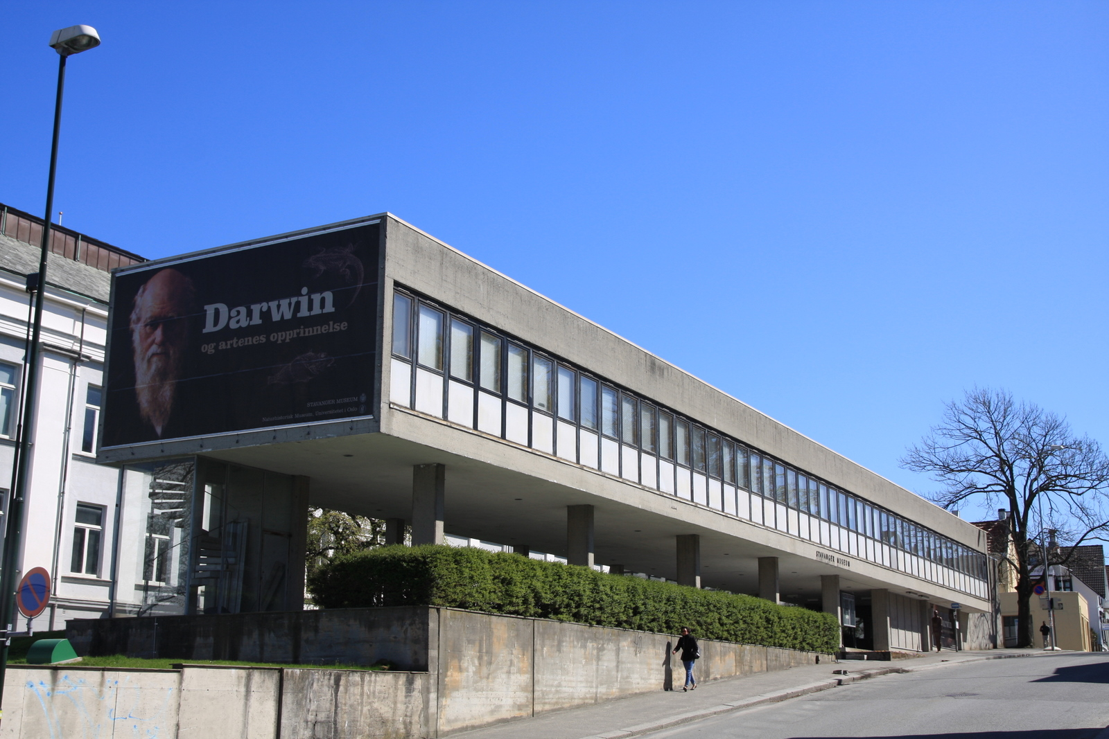 Stavanger Museum